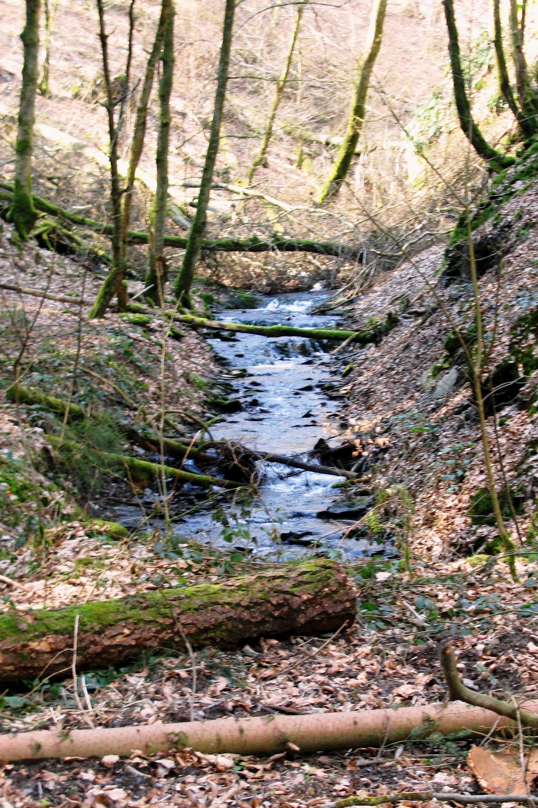 D'Breschterbaach um Fouss vum Schuerelser Schlass.